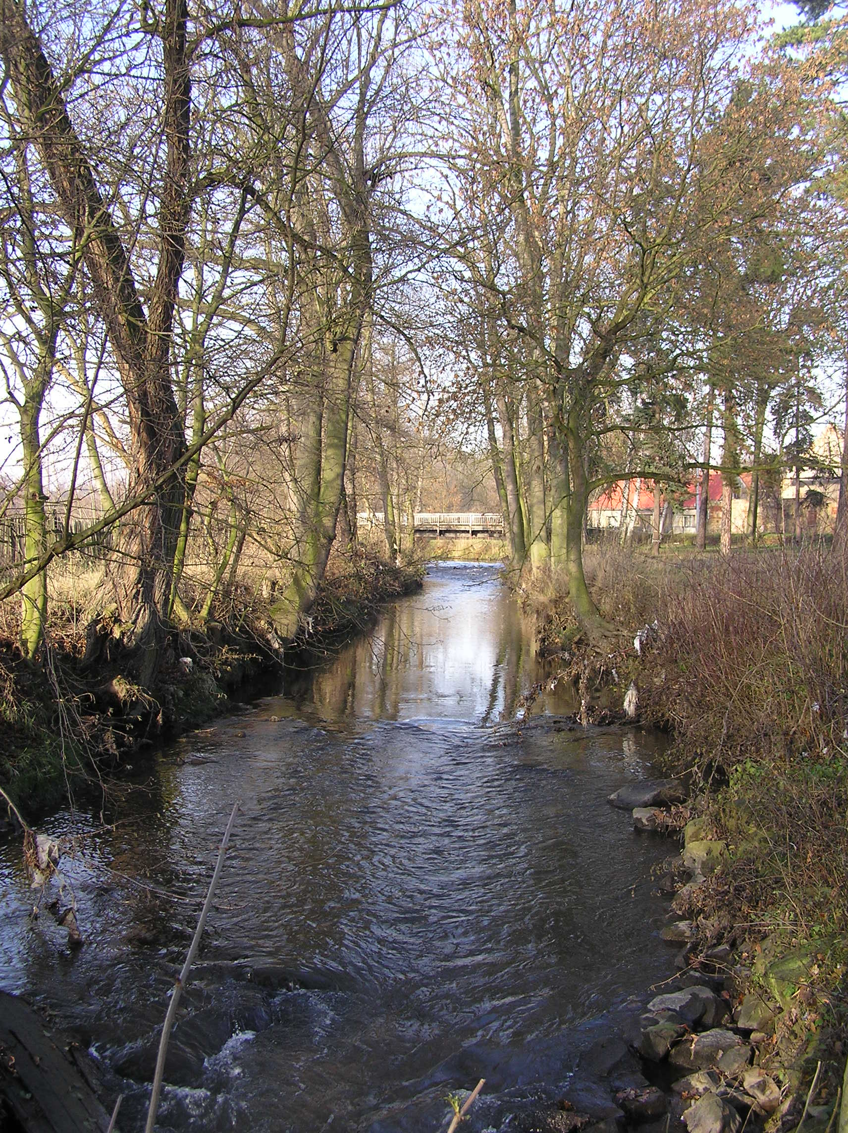 Truzenice, říčka Chomutovka